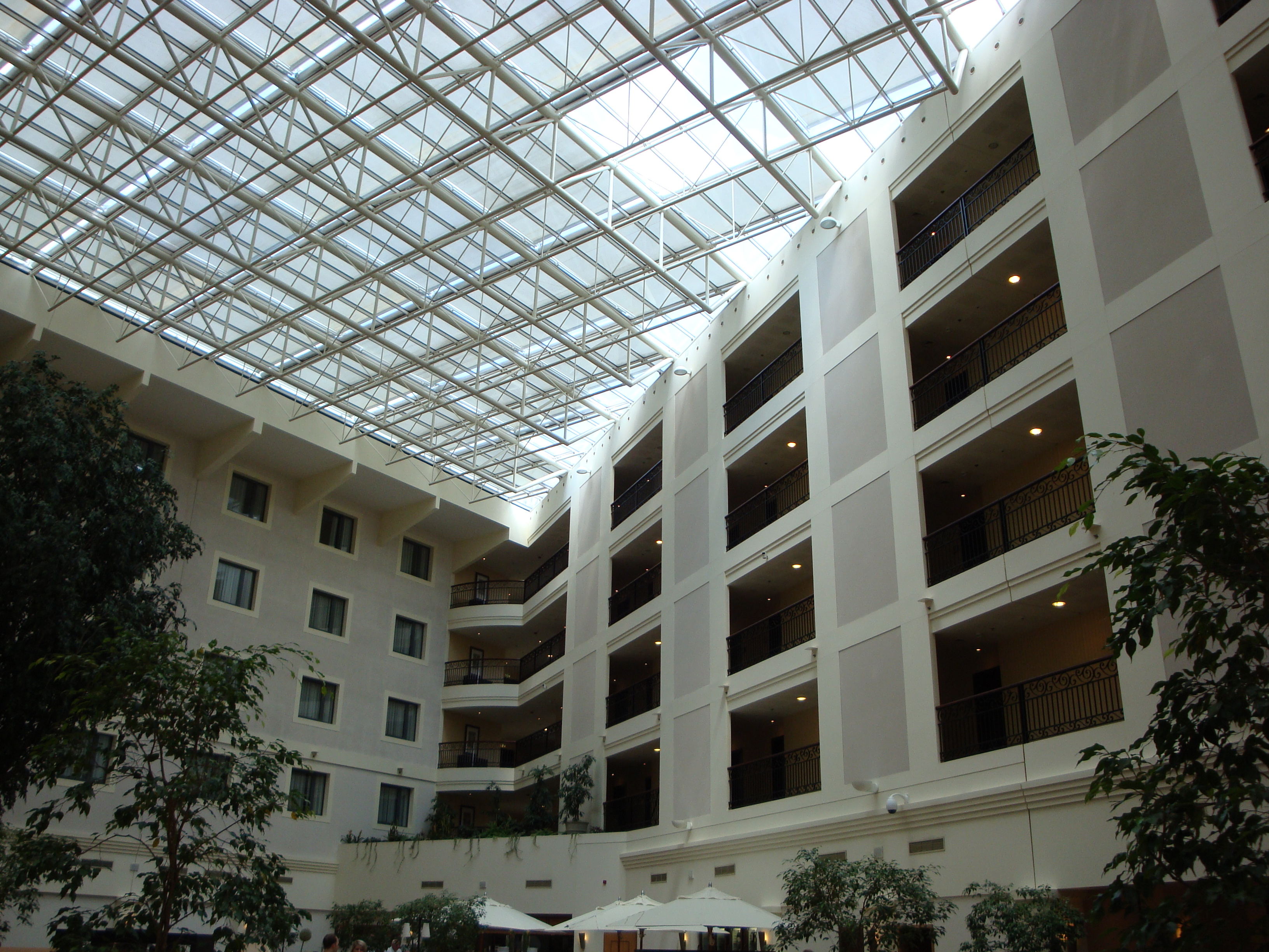 Atrium Hotelu Sheraton w Krakowie.